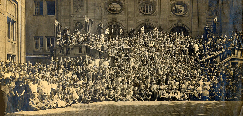 15. Esperanto-Weltkongress, Nürnberg 1923. Massenfoto der Teilnehmer